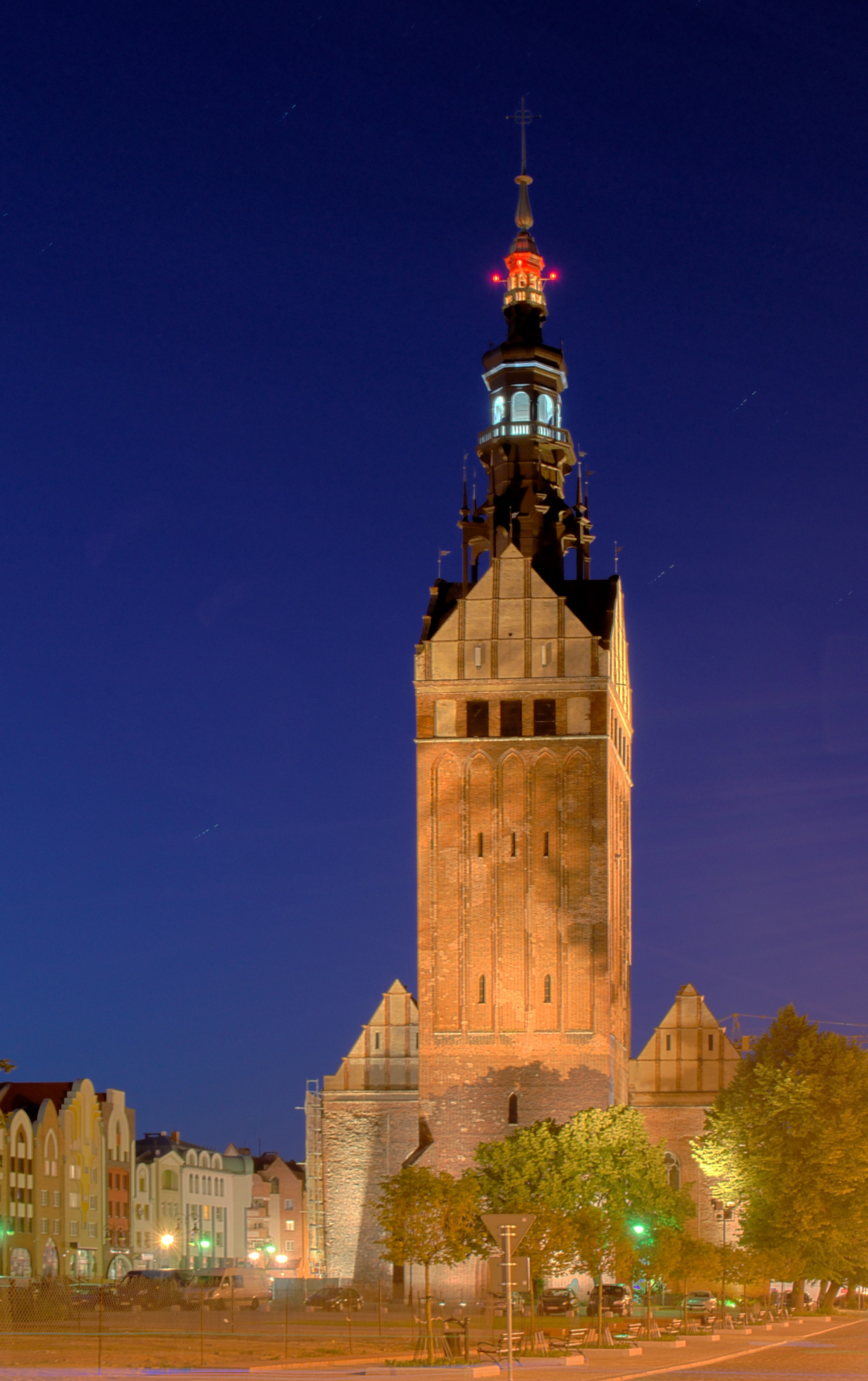 Wieża-dzwonnica Katedry św. Mikołaja w Elblągu (97 m wysokości) nocą, zdjęcie HDR.